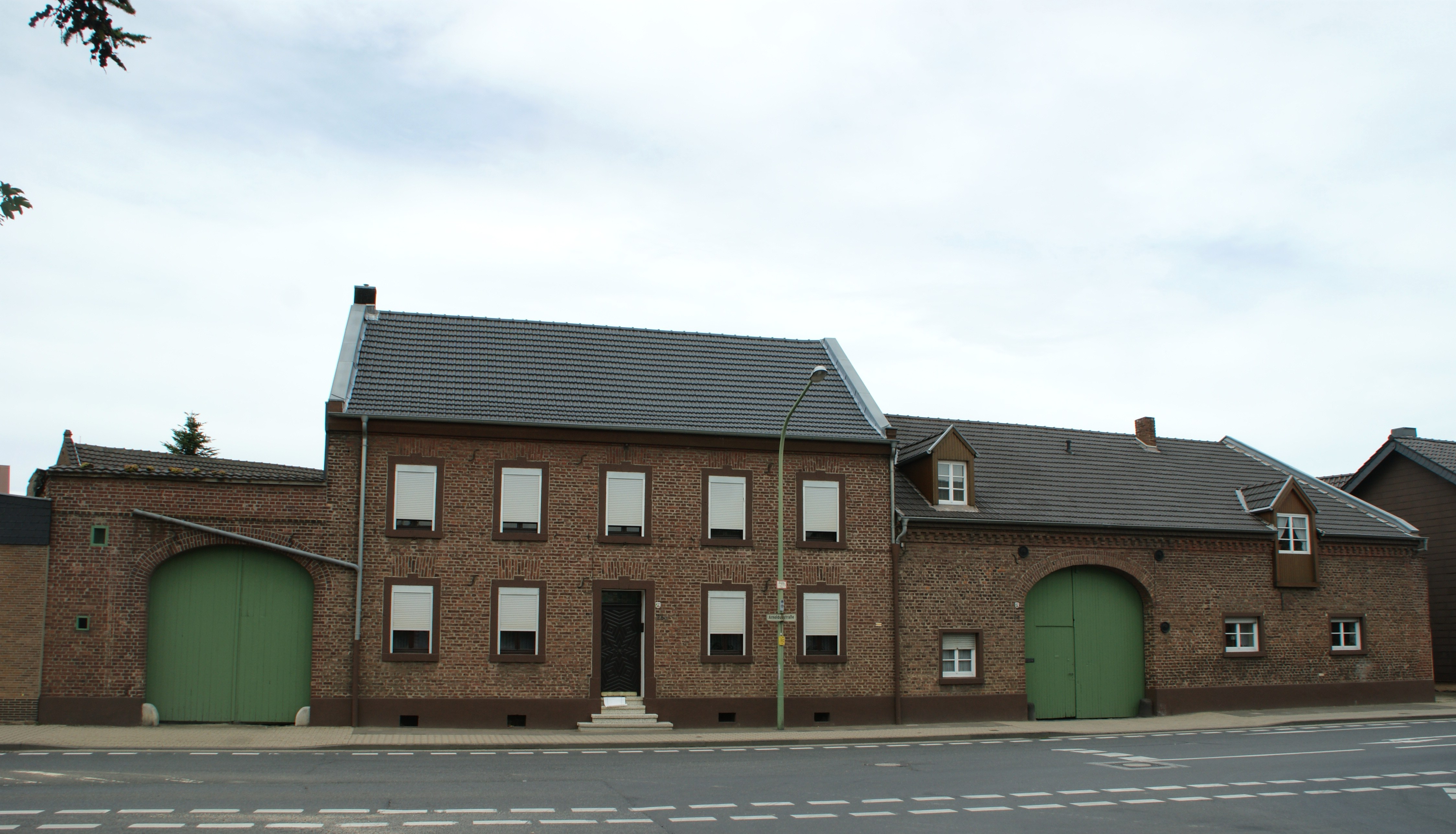 Denkmal Arnoldusstraße 26 in Arnoldsweiler